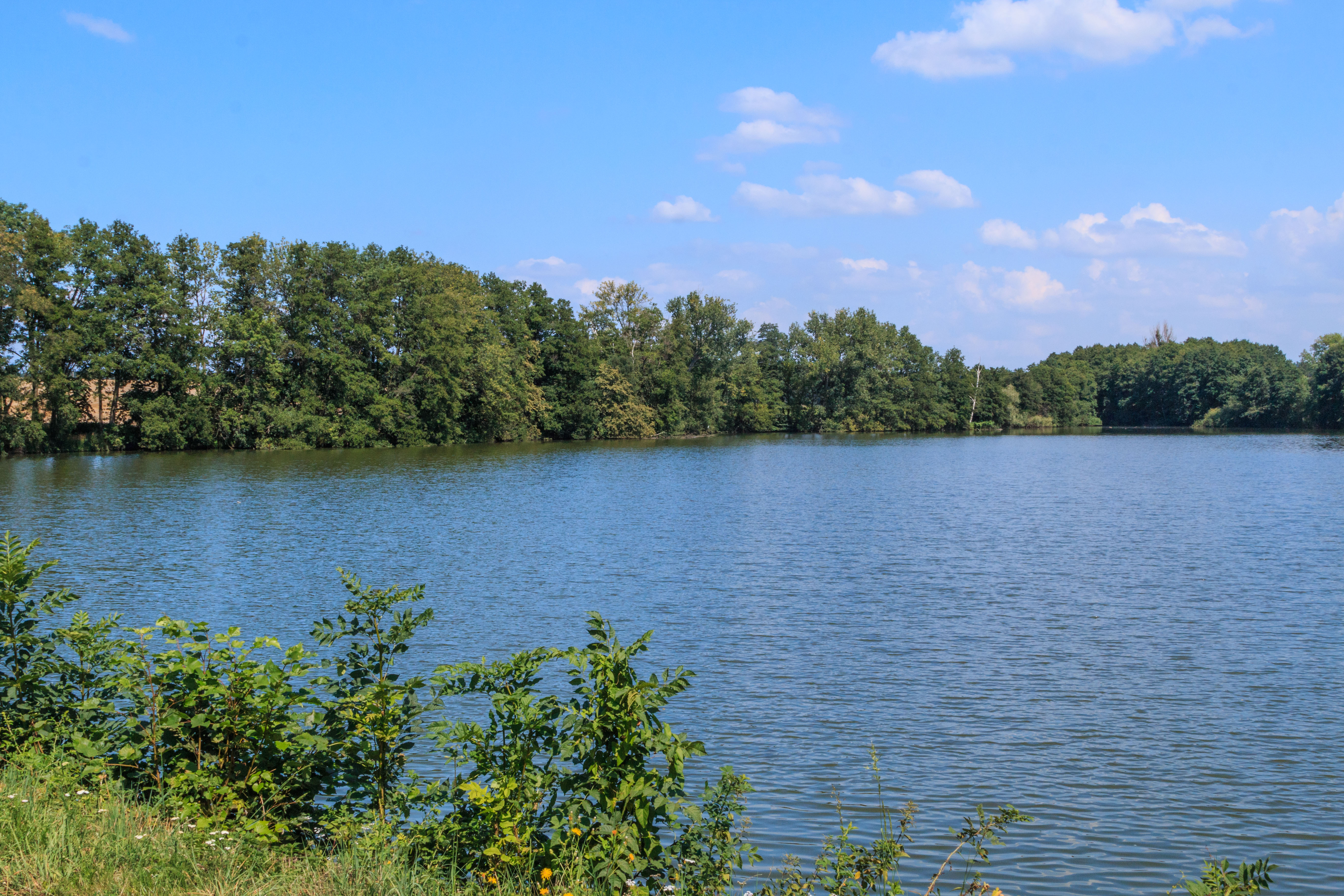 Rybník Malá strana u Zálší Project: Vodstvo.